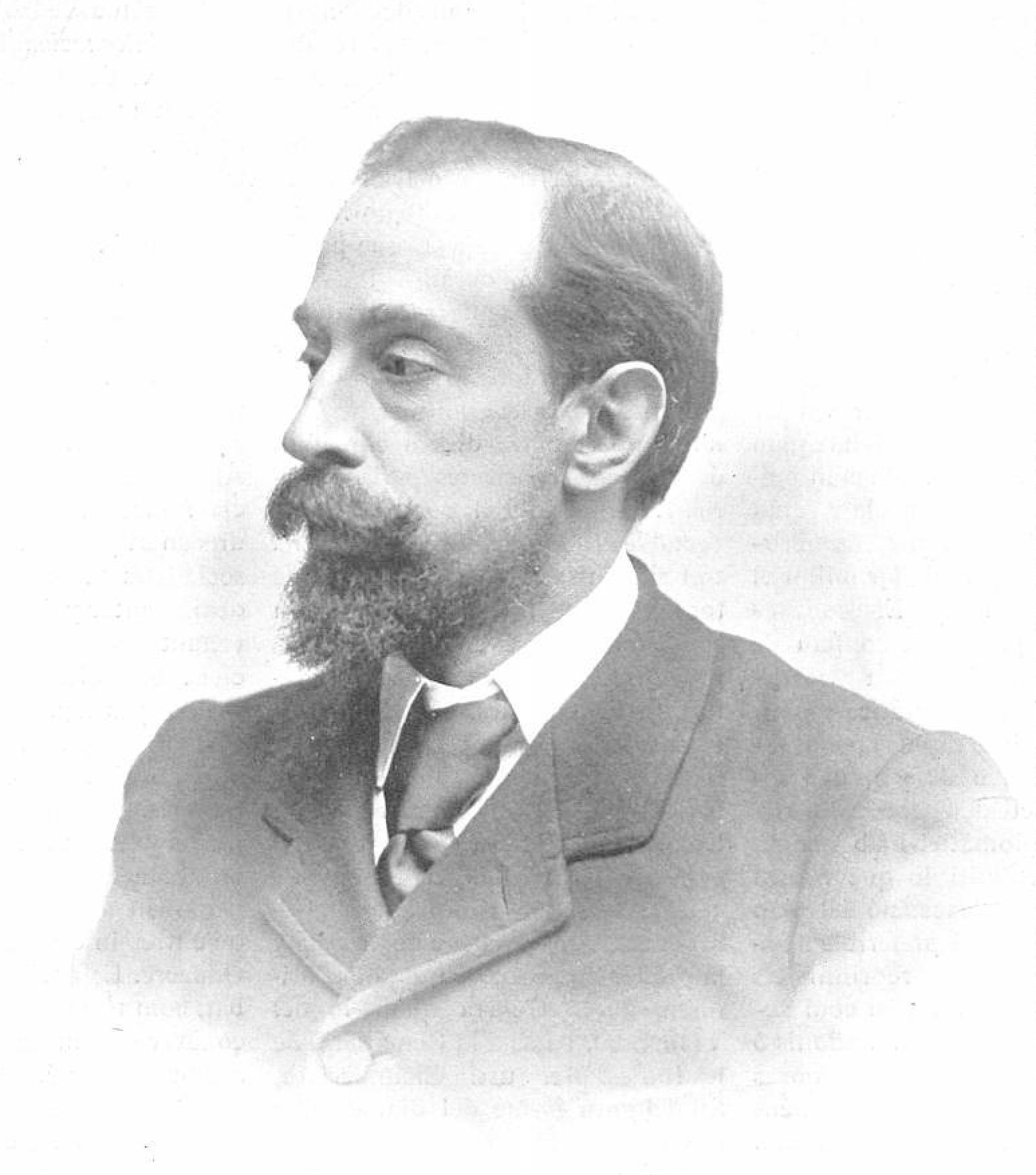 Retrato de Joan Maragall.